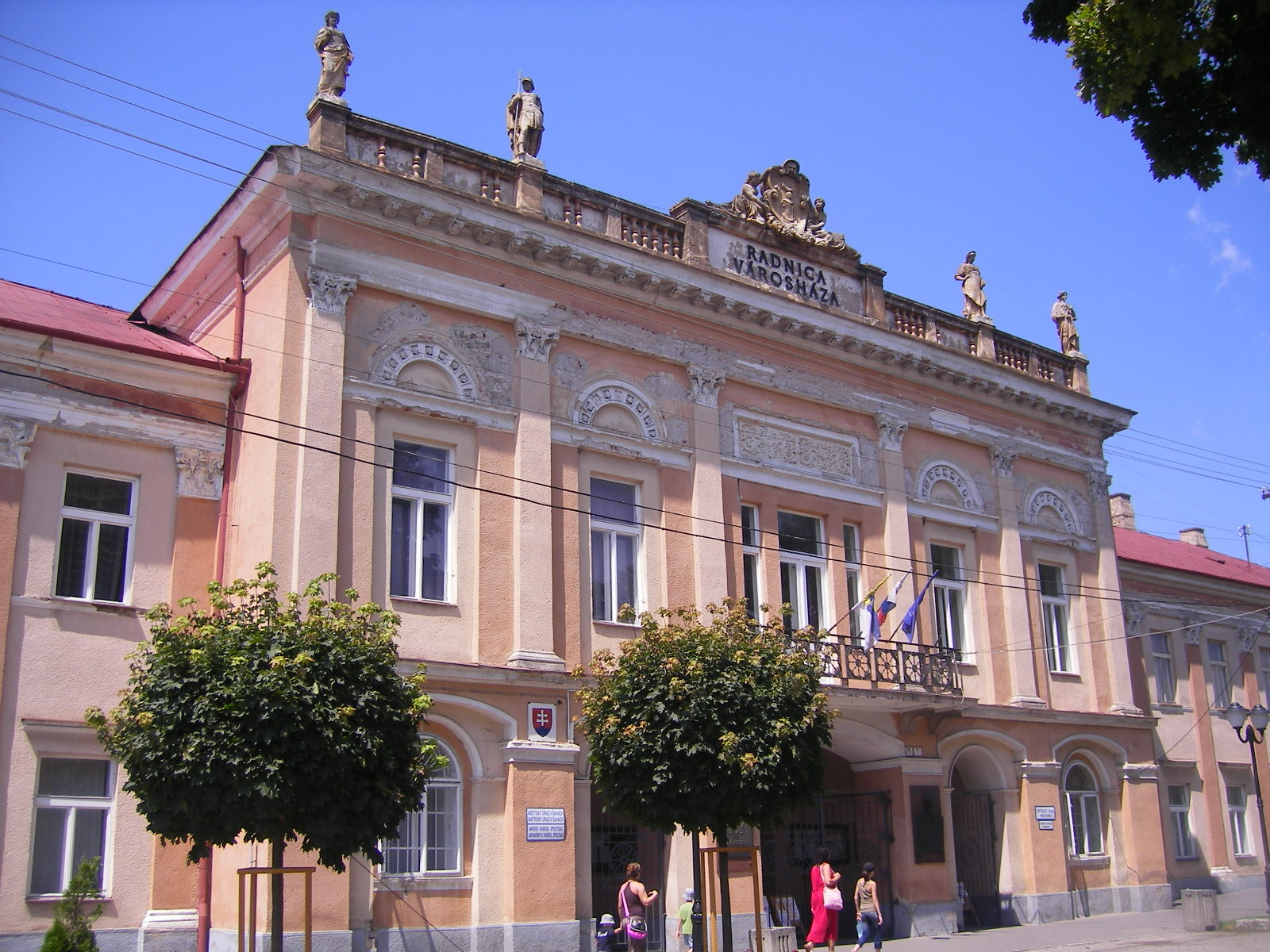 Ipolyság - városháza (egykori vármegyeháza) This medium shows the protected monument with the number 402-1647/1 in the Slovak Republic.